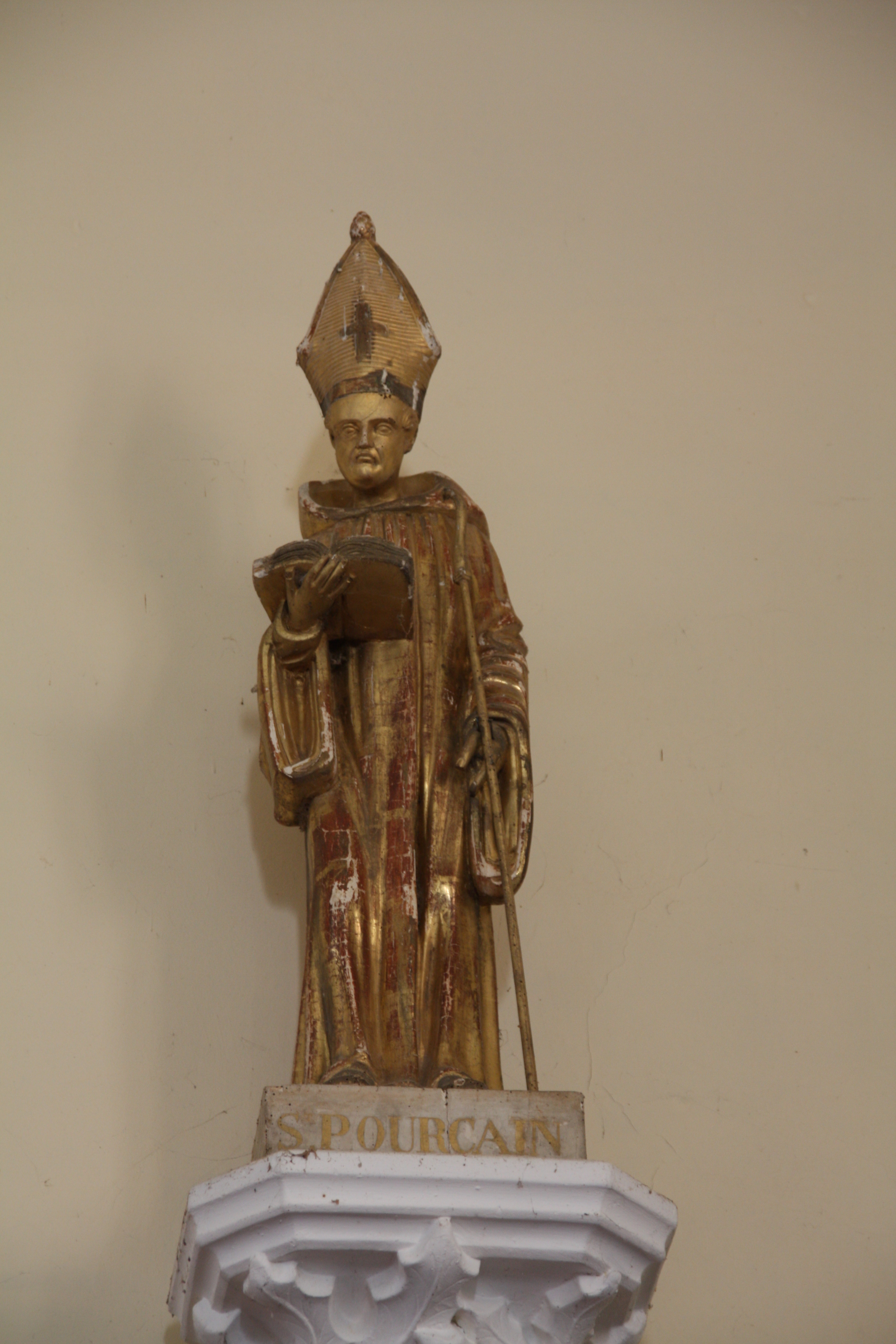 Église de Monestier, Allier, France